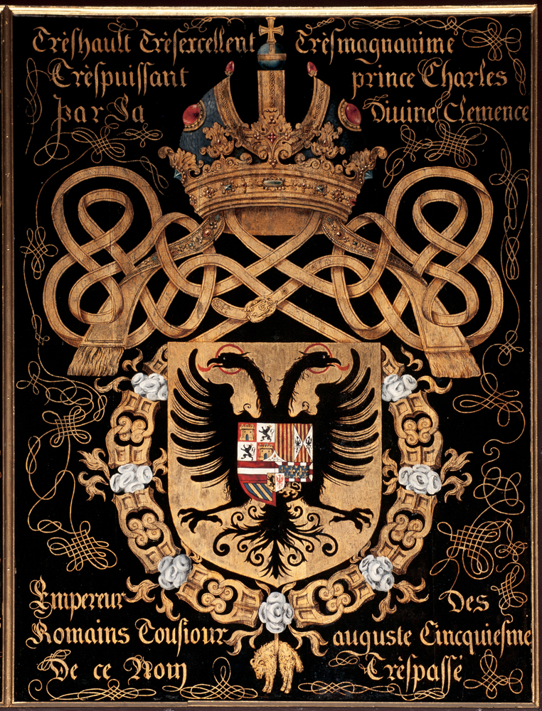 schilder uit Valenciennes; vermoedelijk Jacques Le Boucq, Blazoen van het 23ste Gulden-Vlieskapittel, 1559, Prince Charles (Keizer Karel); inv: 433 N.111